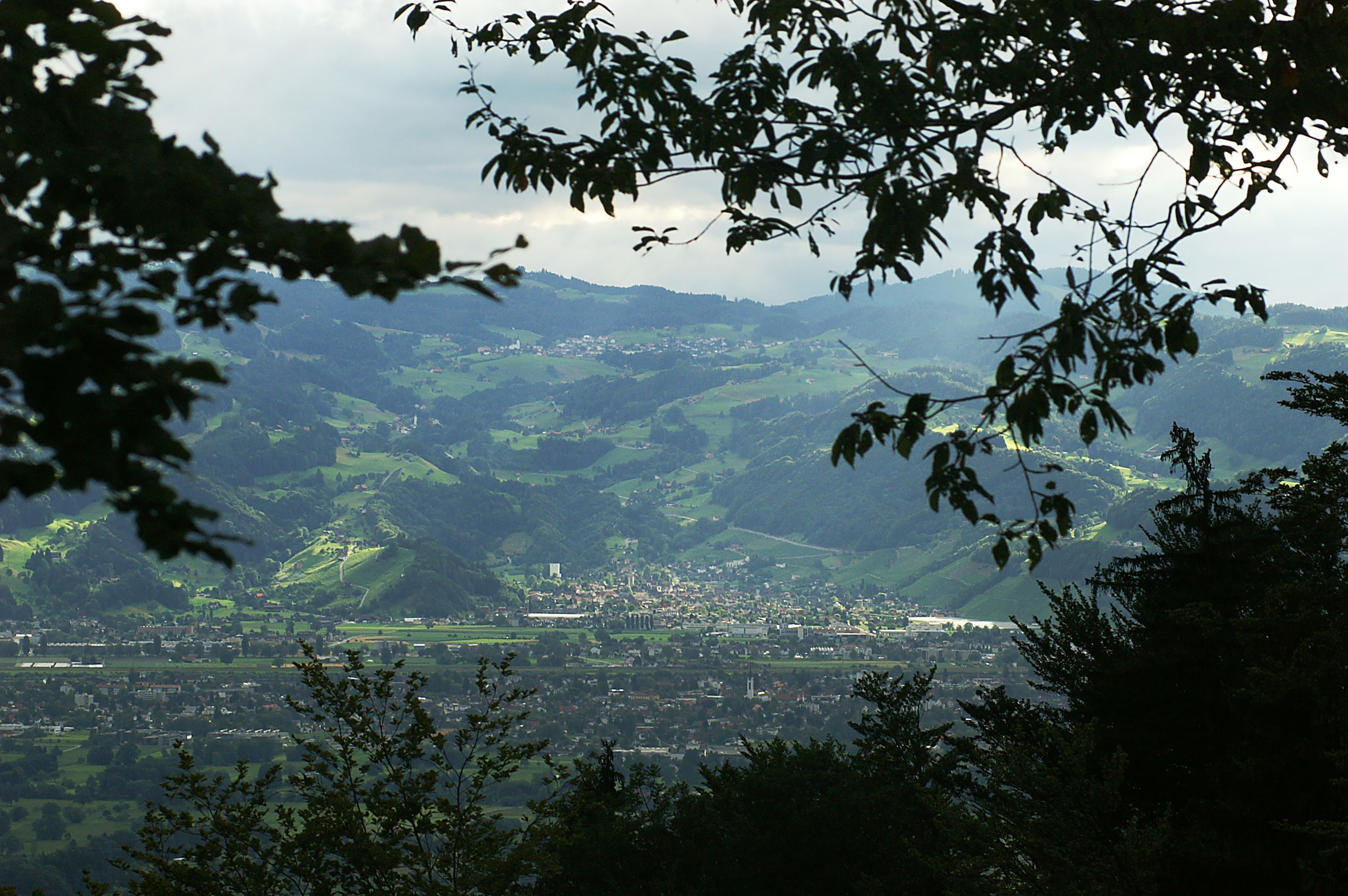 Berneck SG gesehen vom Oberfallenberg in Dornbirn